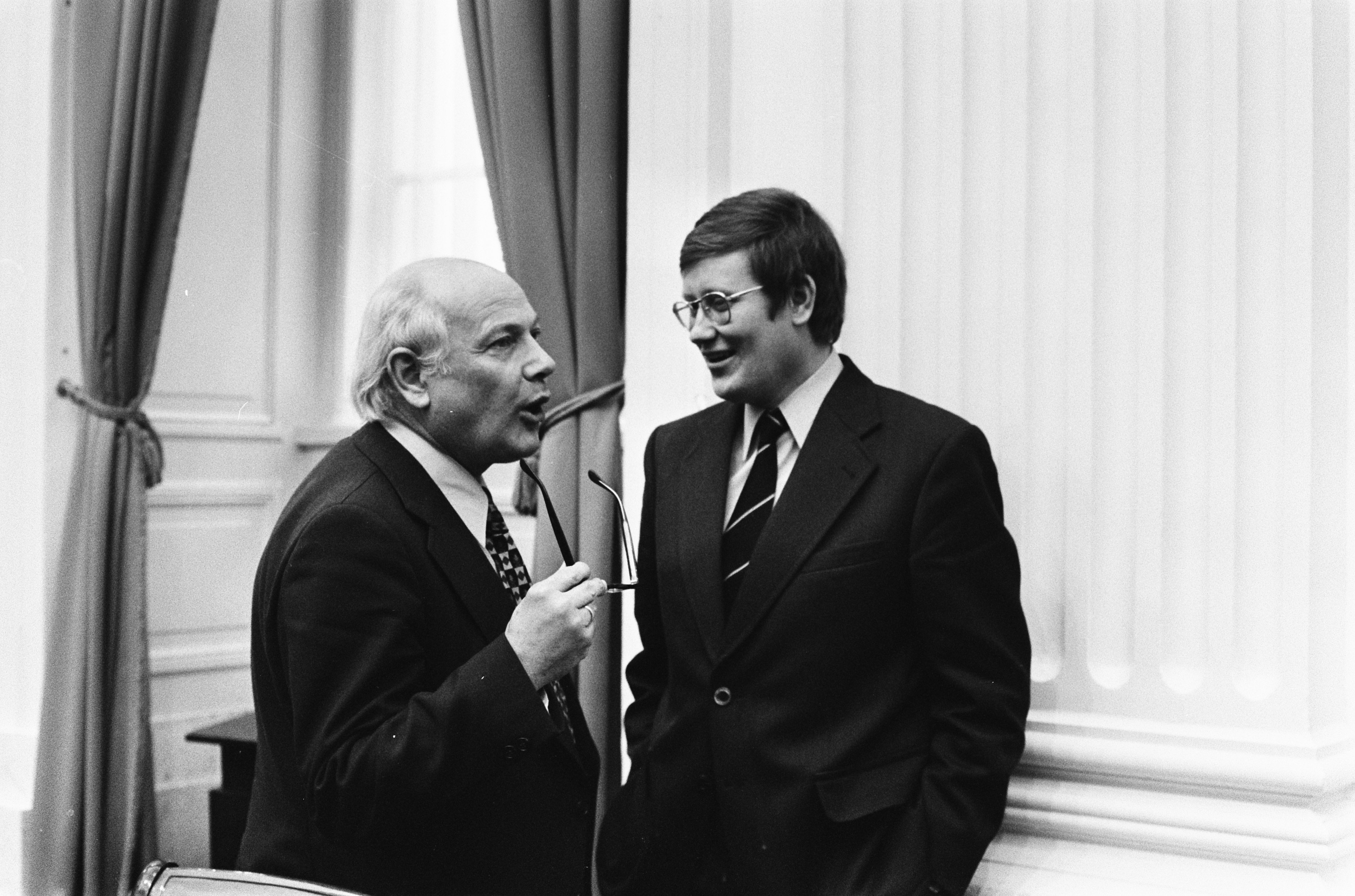 Collectie / Archief : Fotocollectie Anefo Reportage / Serie : Behandeling in de Tweede Kamer van het ontslag van Glastra van Loon (D66) als staatssecretaris van Justitie Beschrijving : Minister-president Den Uyl (links) en Wiegel, fractievoorzitter VVD Datum : 3 juni 1975 Locatie : Den Haag, Zuid-Holland Trefwoorden : fractievoorzitters, minister-presidenten, parlementariërs Persoonsnaam : Uyl, Joop den, Wiegel, Hans Fotograaf : Fotograaf Onbekend / Anefo Auteursrechthebbende : Nationaal Archief Materiaalsoort : Negatief (zwart/wit) Nummer archiefinventaris : bekijk toegang 2.24.01.05 Bestanddeelnummer : 927-9678